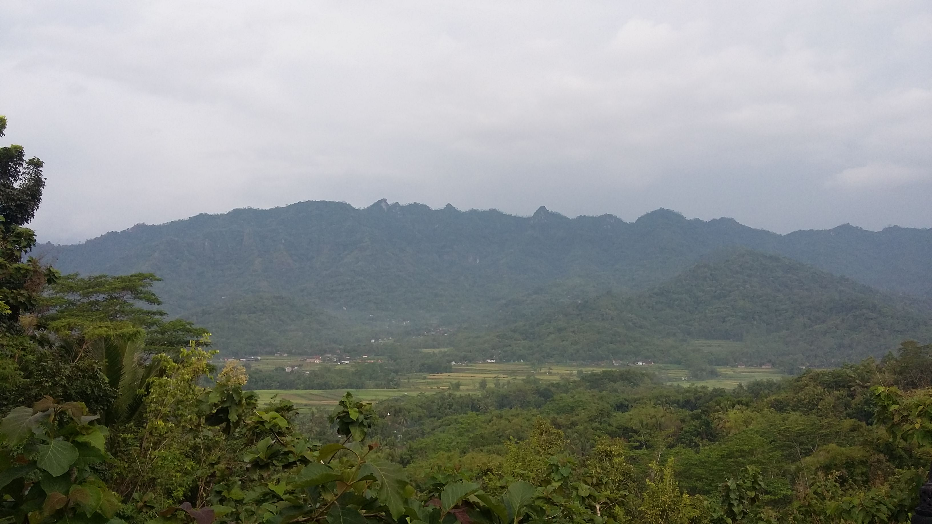 Jika kita ke bukit Rhema daerah Borobudur, Magelang, Jawa Tengah, Indonesia, kita akan mendapati bangunan gereja berbentuk burung merpati yang lebih dikenal sebagai gereja ayam. Pemandangan ini dapat kita lihat di sebelah barat gereja tersebut.